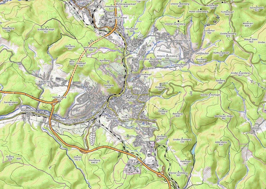 Topographical map of Suhl. This map may be incomplete, and may contain errors. Don't rely solely on it for navigation.